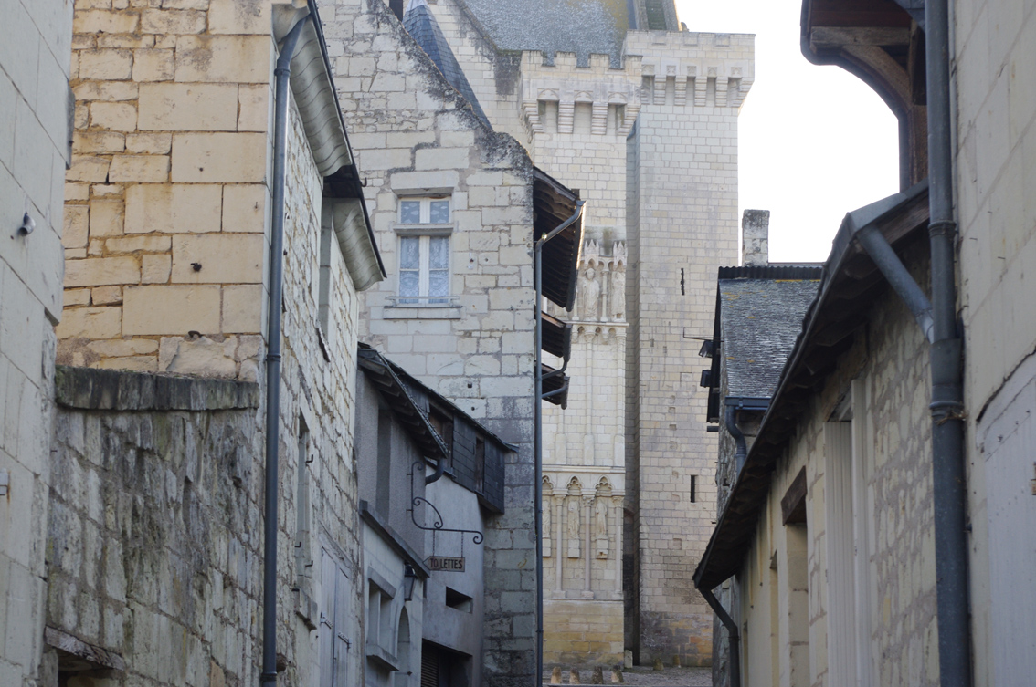 Ruelle à Candes-Saint-Martin, Indre-et-Loire, avec vue de la collégiale